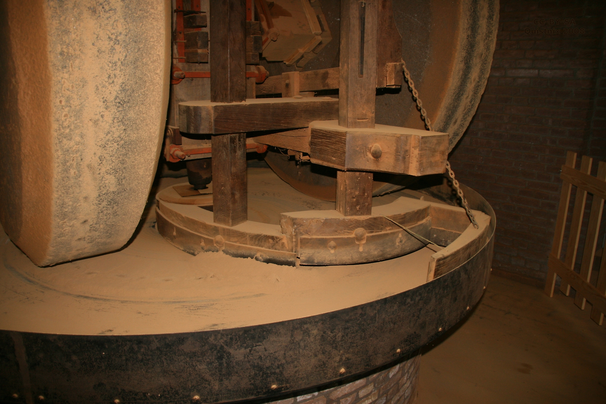 Rotterdam-Kralingen, windmolen De Ster: het malen van kaneel